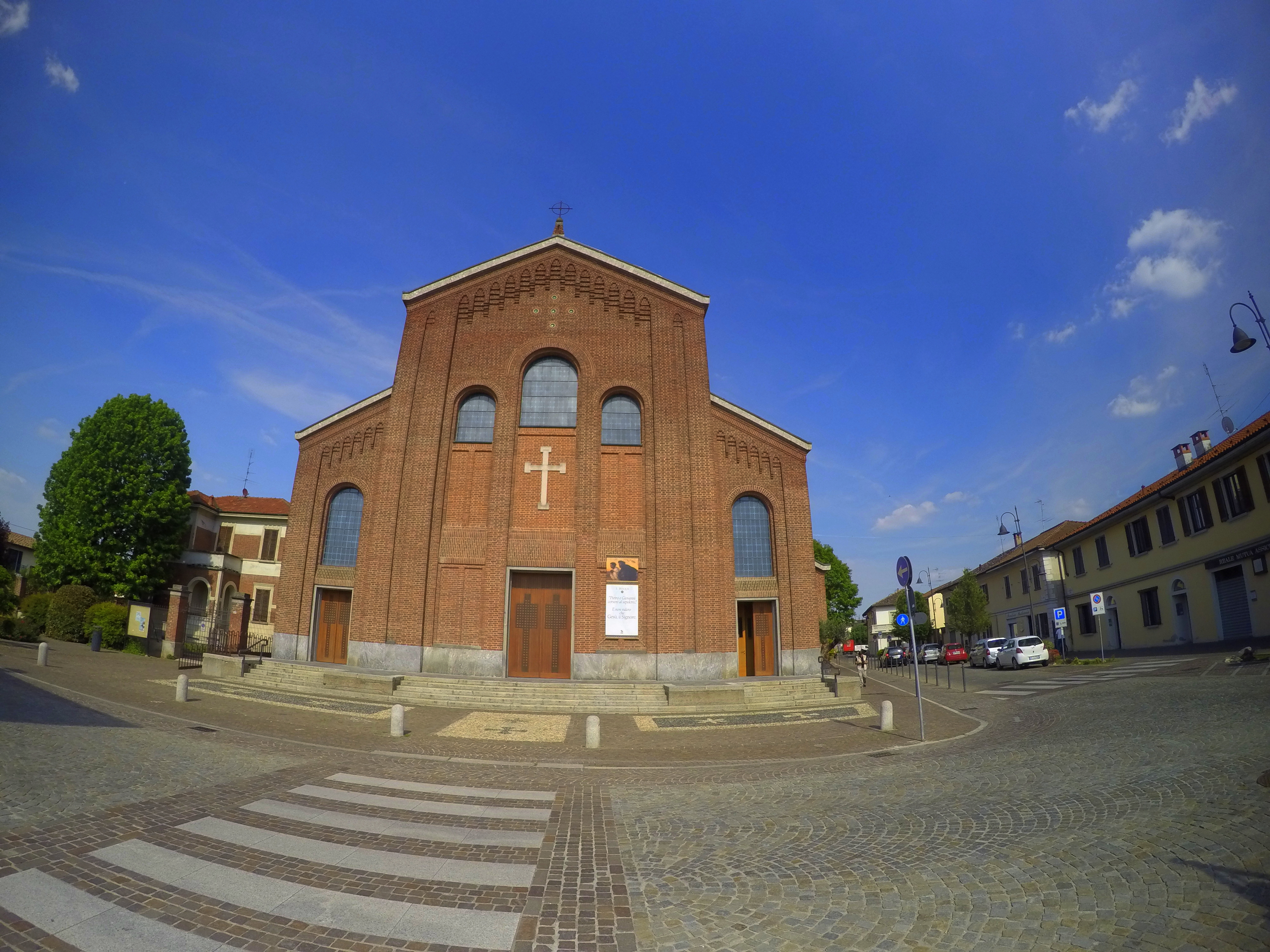 Albairate - Chiesa parrocchiale di San Giorgio Martire